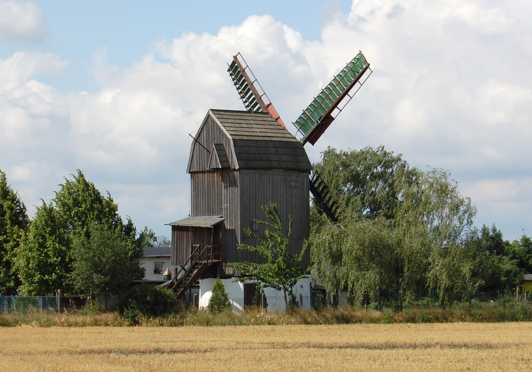 Windmühle Pömmelte